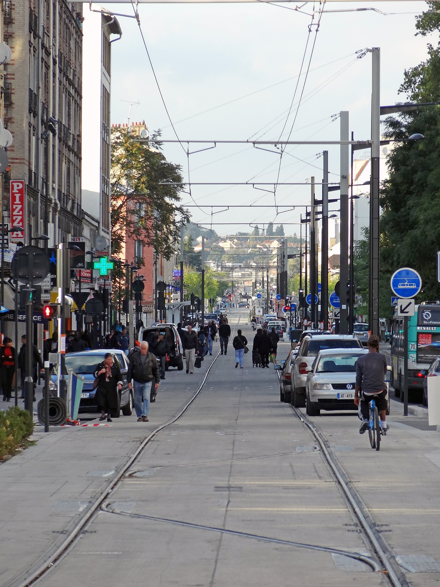 Plateforme du tramway T5 vue de la station Marché de Saint-Denis, Saint-Denis (Seine-Saint-Denis), France.